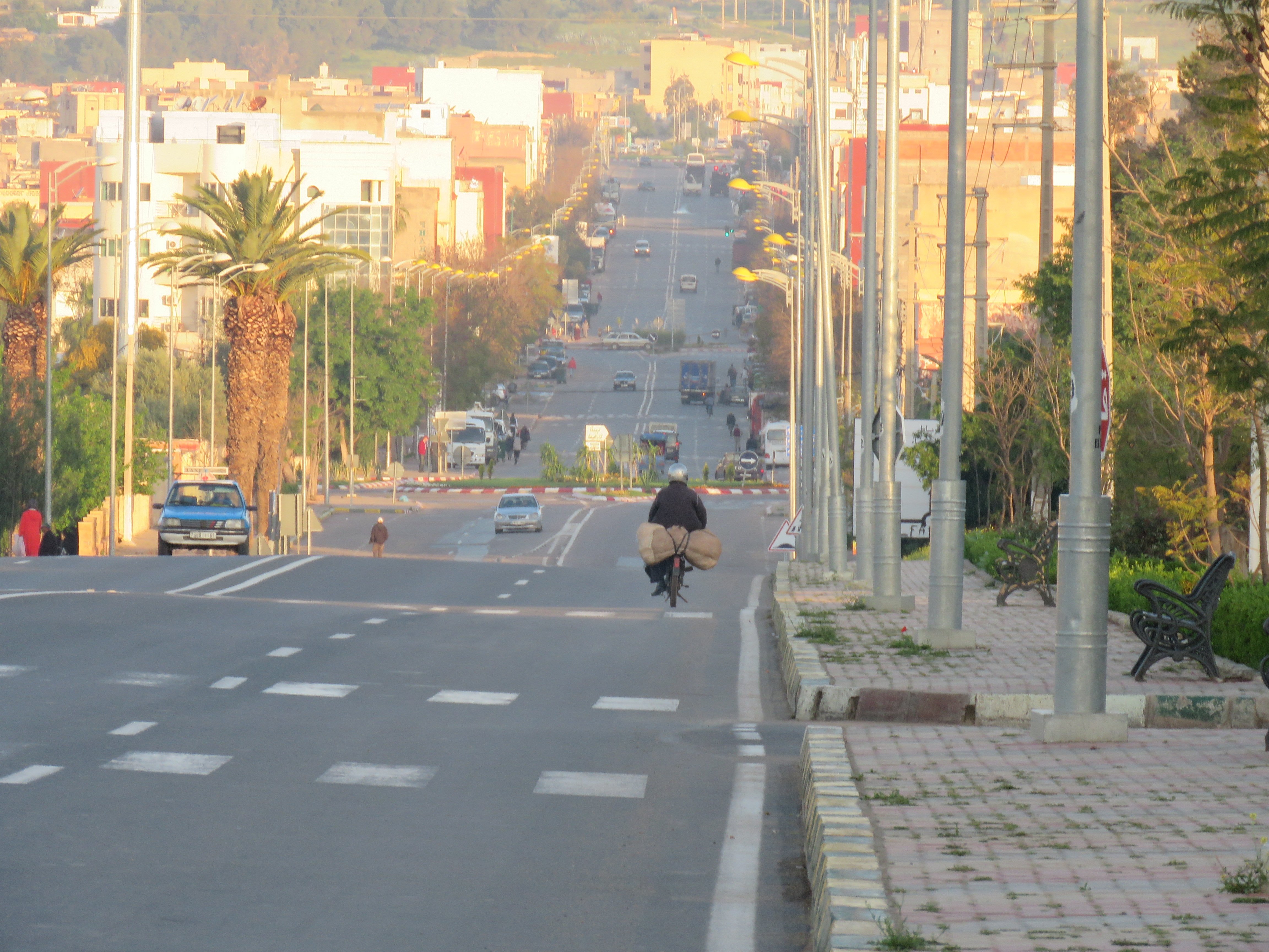 شهد لشارع الدار البيضاء من مدينة وادي زم